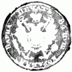 Оттиск печати линейного корабля Варна.